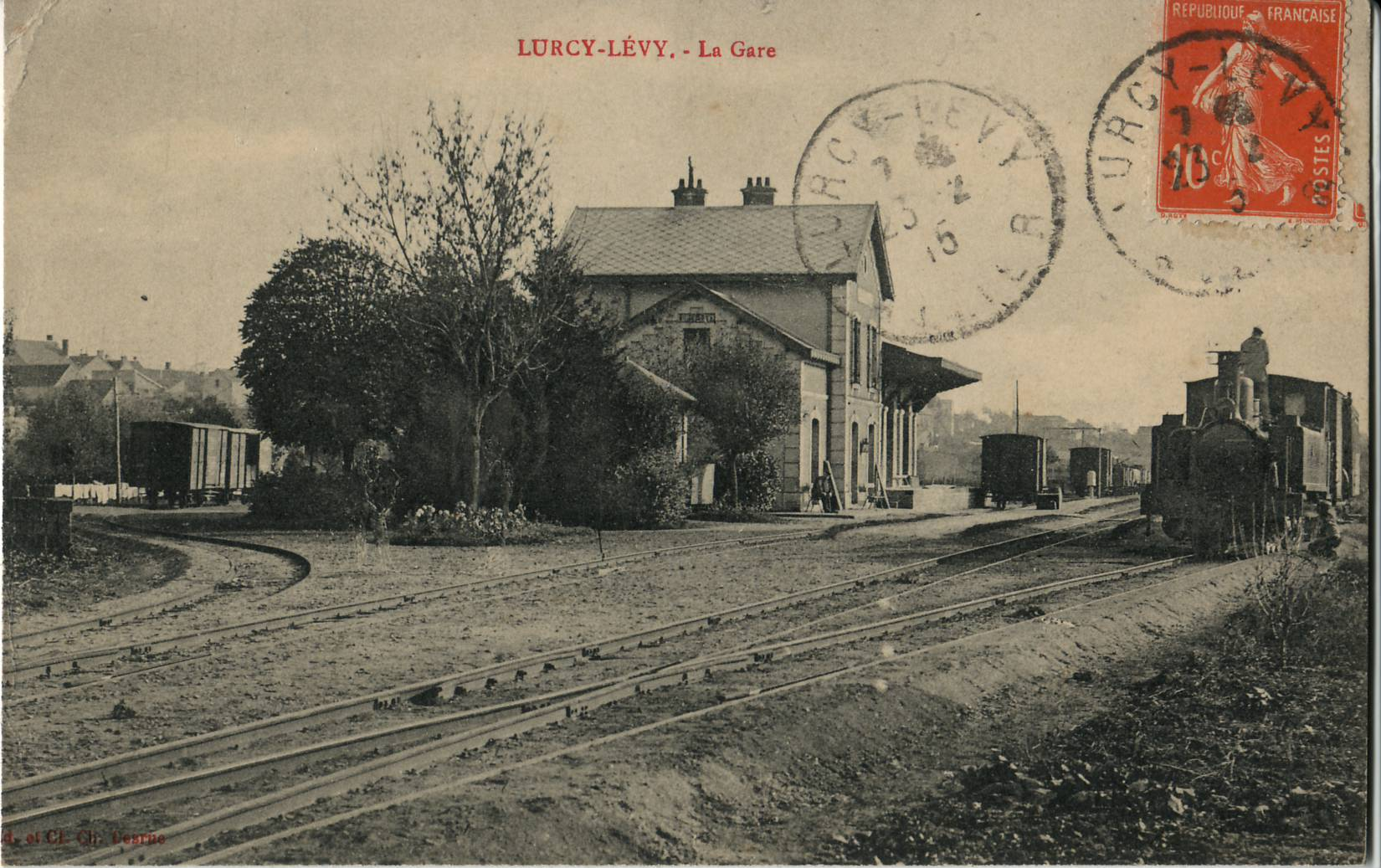 Carte postale ancienne éditée par Desrue :LURCY-LEVY - La Gare